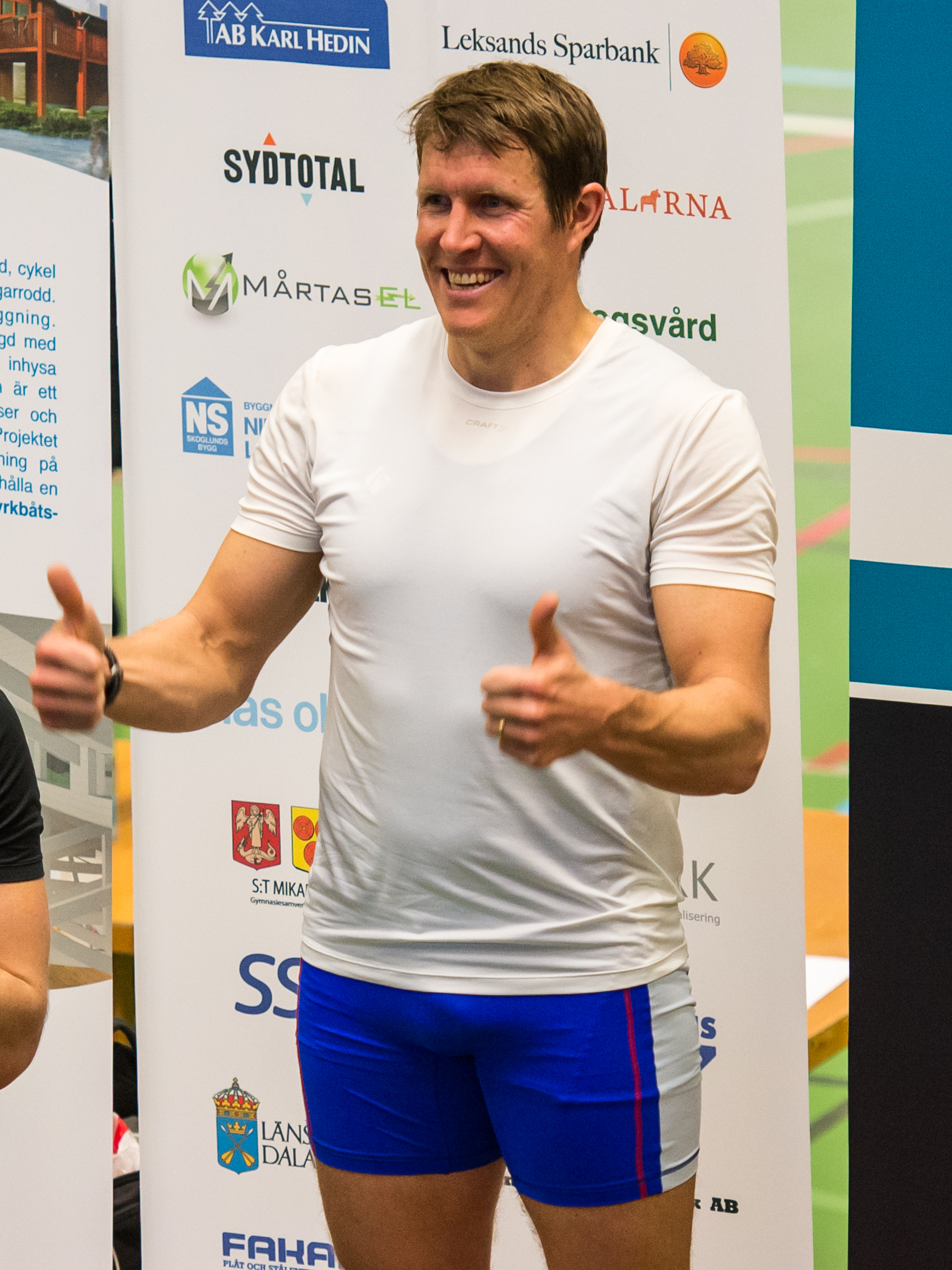 SM i rodd (inomhus), första gången grenen har SM-status. Segraren i herrarnas 2 000 m, Lassi Karonen (Brudpiga RK).